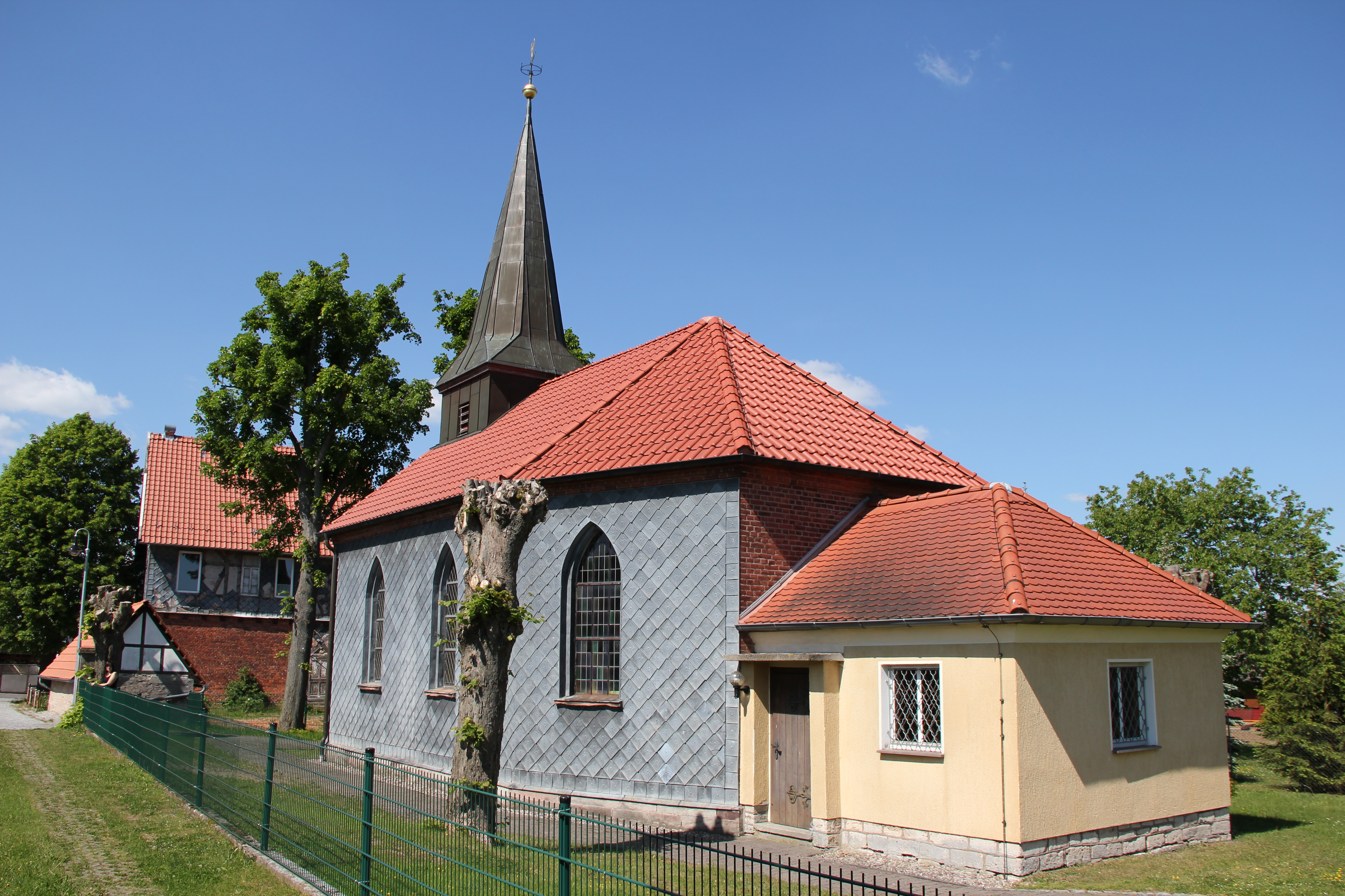 Die Kirche (Heilige Drei Könige) in Fürstenhagen (Eichsfeld), dahinter die ehemalige Schule